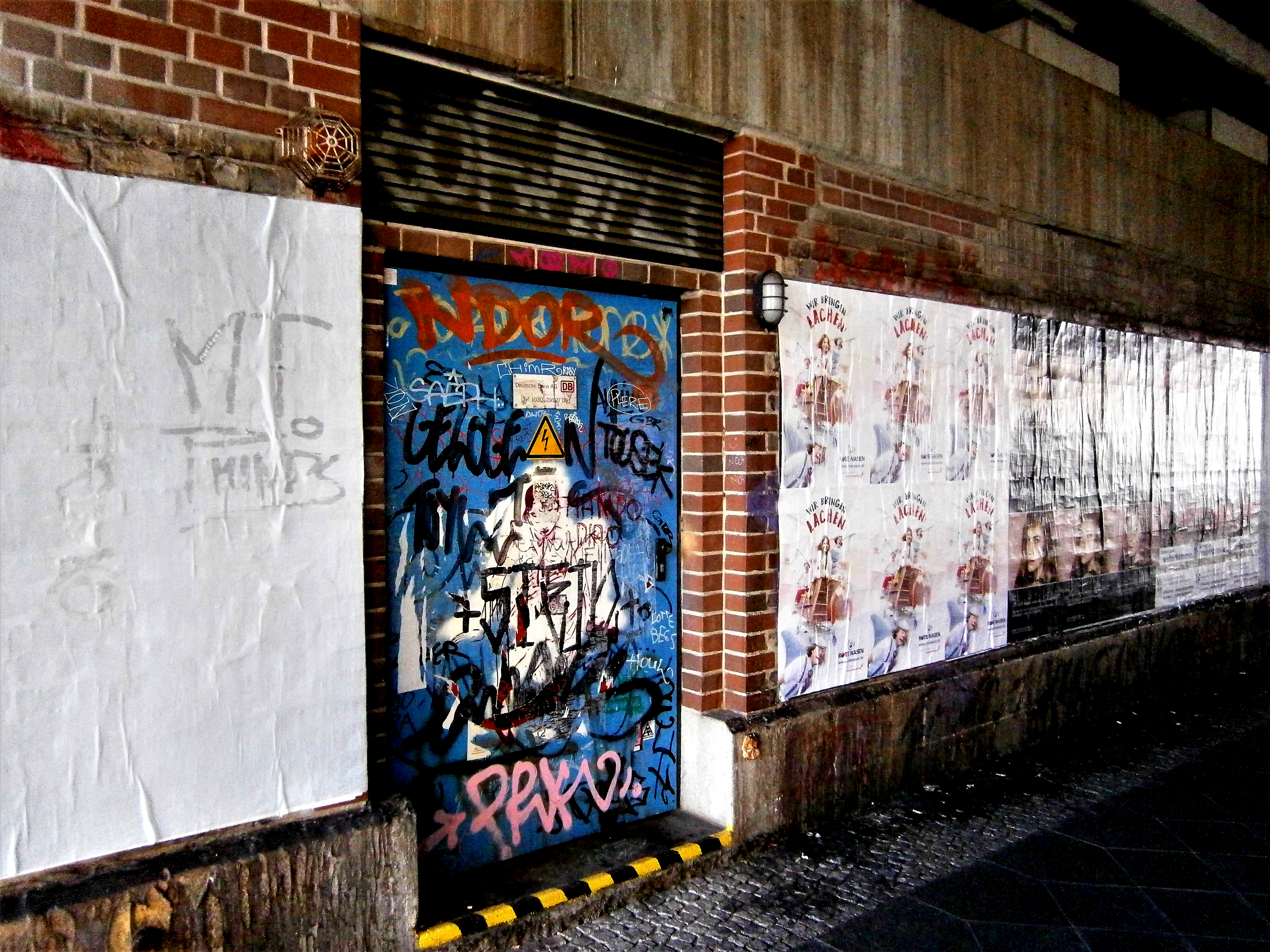 Die Andreasstraße ist eine Straße im Berliner Bezirk Friedrichshain-Kreuzberg, Ortsteil Friedrichshain. Angelegt wurde sie 1862 auf vorherigen Gartenland und 1863 benannt. Bis um 1900 waren die Grundstücke bebaut und bis 1930 wurde verdichtet. Bei Luftangriffen im Zweiten Weltkrieg wurde die Gebäude schwer getroffen. So ist die Straße seit den 1950er Jahren mit wiederhergestellten Altbauten, aber besondres durch Plattenbau-Wohnblöcke aber seit 1990 auch durch Hotel- und Bürobauten im Umfeld des Ostbahnhofs charakterieisiert. Das Bild zeigt: Eingang zu Andreasstraße 6, den Räumen unter der Stadtbahn.